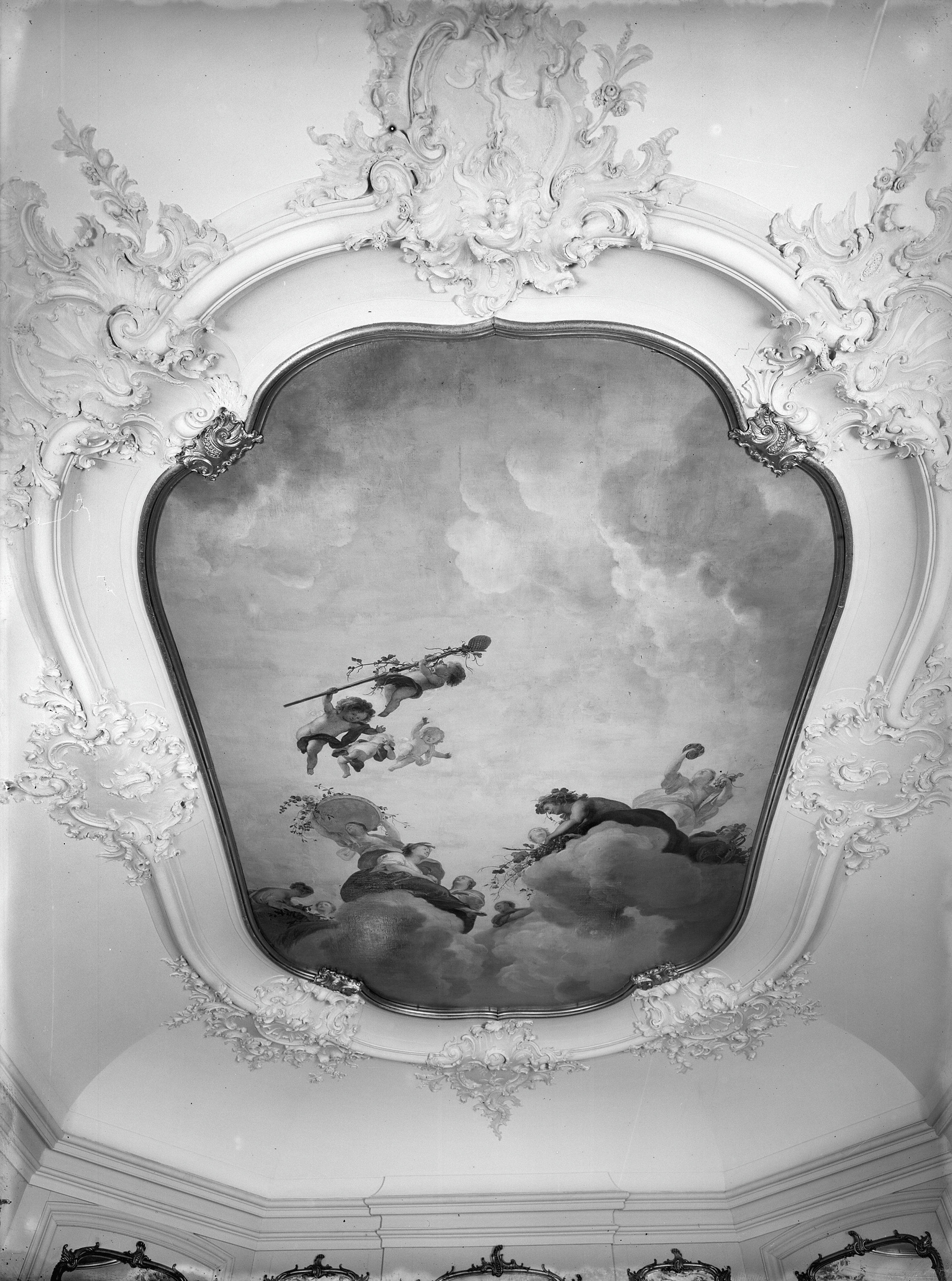 Boschbeek: achterzijde plafond